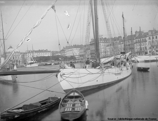 Photographie du bassin du commerce au Havre, au XIXe siècle. Titre(s) : [Normandie, 1903-1912] [Image fixe numérisée] / Jules Girard, photogr. Publication : [Saint-Cyr] : [Direction du patrimoine. Archives du patrimoine photographique], [1903-1912] Description matérielle : 51 photogr. pos. : n. et b. ; 18 x 24 cm (plaque de verre) Note(s) : Acq. : Archives photographiques (Médiathèque du patrimoine) (c)Caisse nationale des Monuments historiques et des Sites Tournage : 19030000, 19120000 Domaine(s) : Géographie ; Notice n° : FRBNF38465995